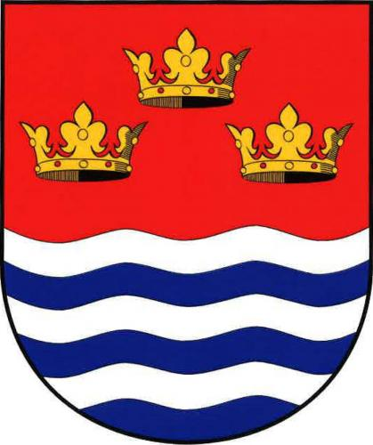 znak, Stanovice, okres karlovy vary